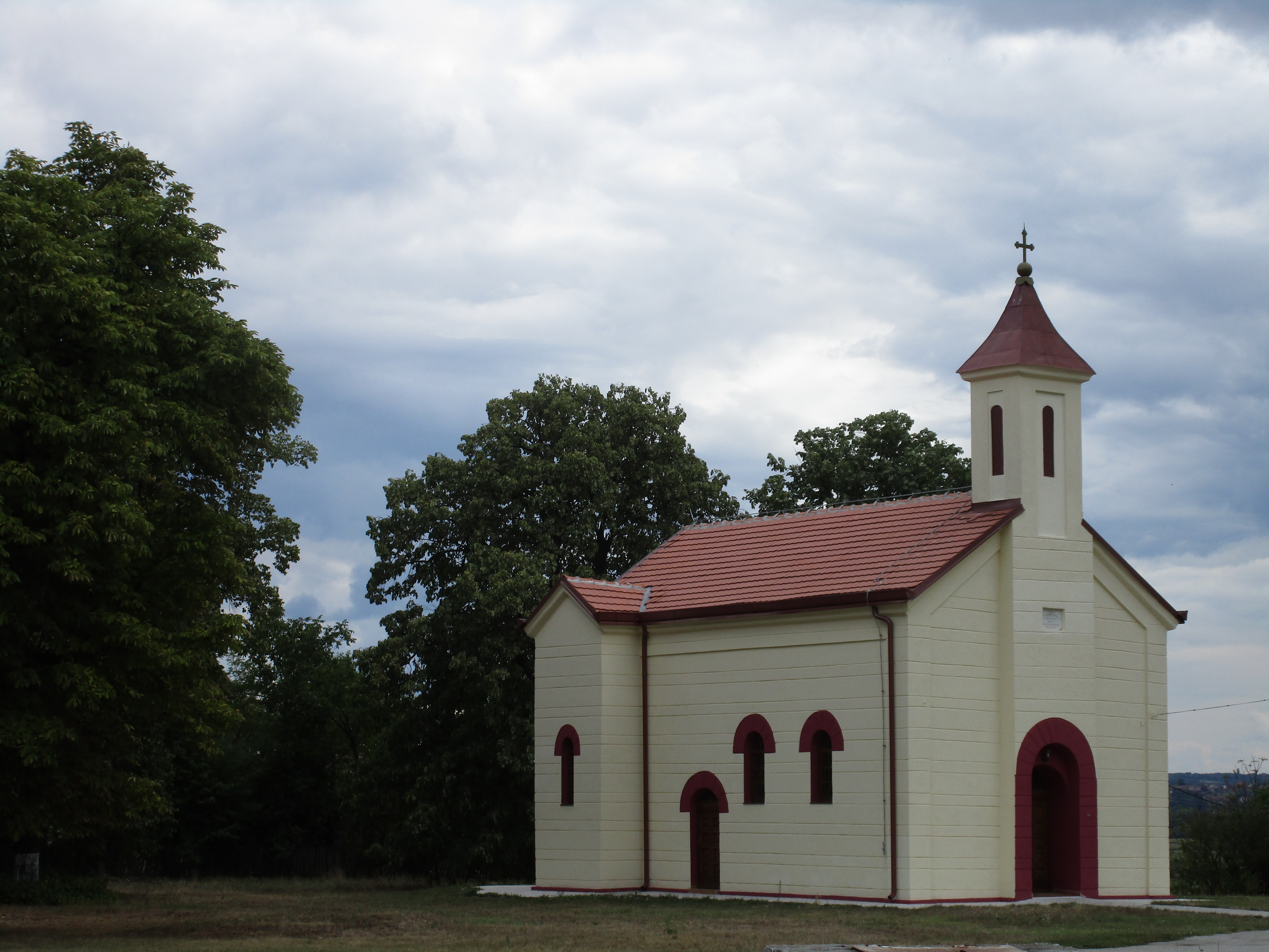 Crkva Rodjenja Presvete Bogorodice, Glibovac